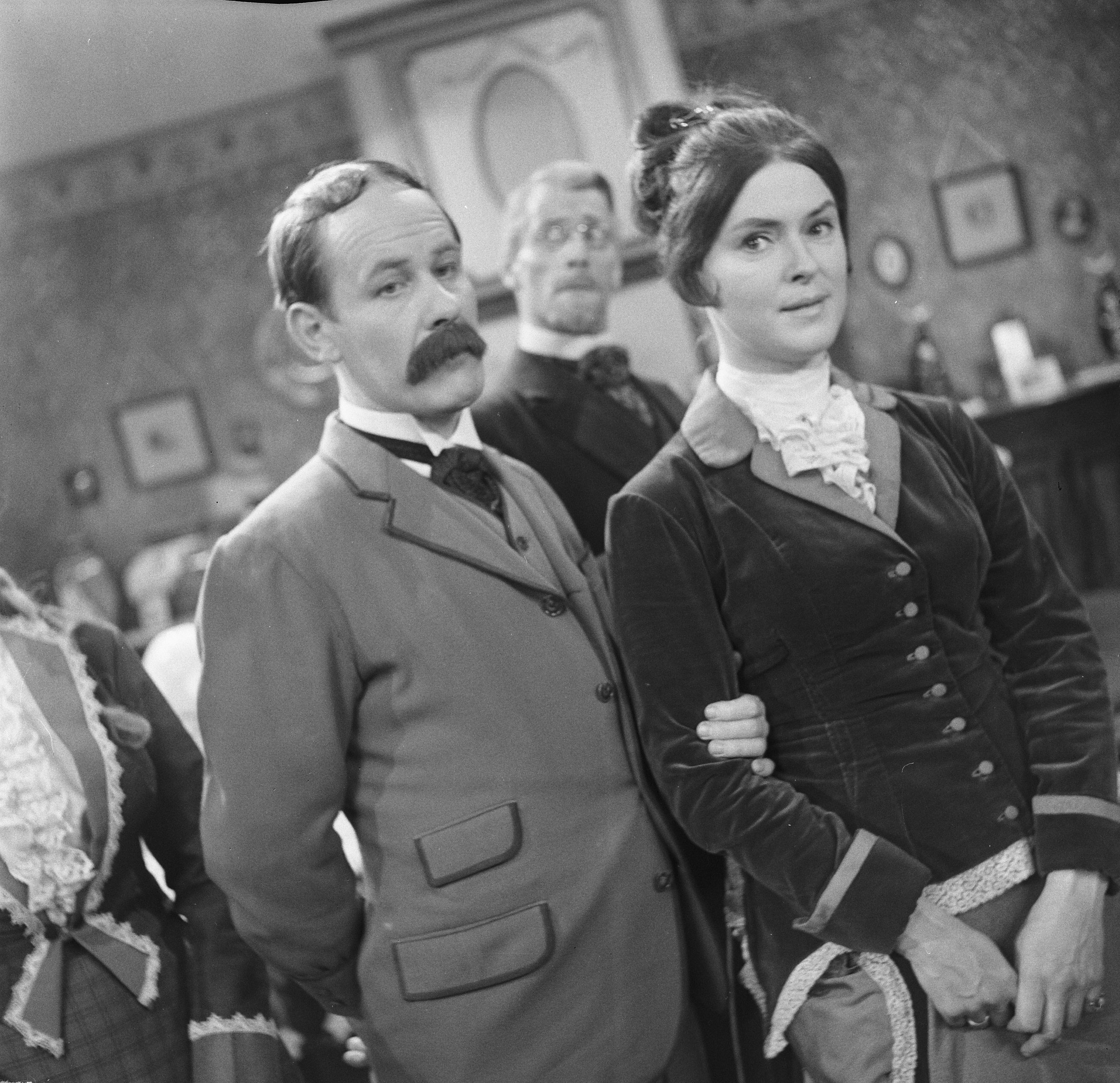 Collectie / Archief : Fotocollectie Anefo Reportage / Serie : [ onbekend ] Beschrijving : Avro televisie. Klucht 'Hotel het Paradijs' . Ina van Faassen , Pieter Lutz , Frits Butzelaar (achtergrond) Datum : 28 februari 1964 Trefwoorden : televisiedrama's, toneel Persoonsnaam : Butzelaar, Frits, Faassen, Ina van, Lutz, Pieter Fotograaf : Nijs, Jac. de / Anefo Auteursrechthebbende : Nationaal Archief Materiaalsoort : Negatief (zwart/wit) Nummer archiefinventaris : bekijk toegang 2.24.01.03 Bestanddeelnummer : 916-1059 Reacties Geplaatst door Toneelliefhebber op 18 januari 2016 - 17:42. AVRO televisie. Televisiespel Hotel 'Het Paradijs' Uitgezonden op 18 mei 1964